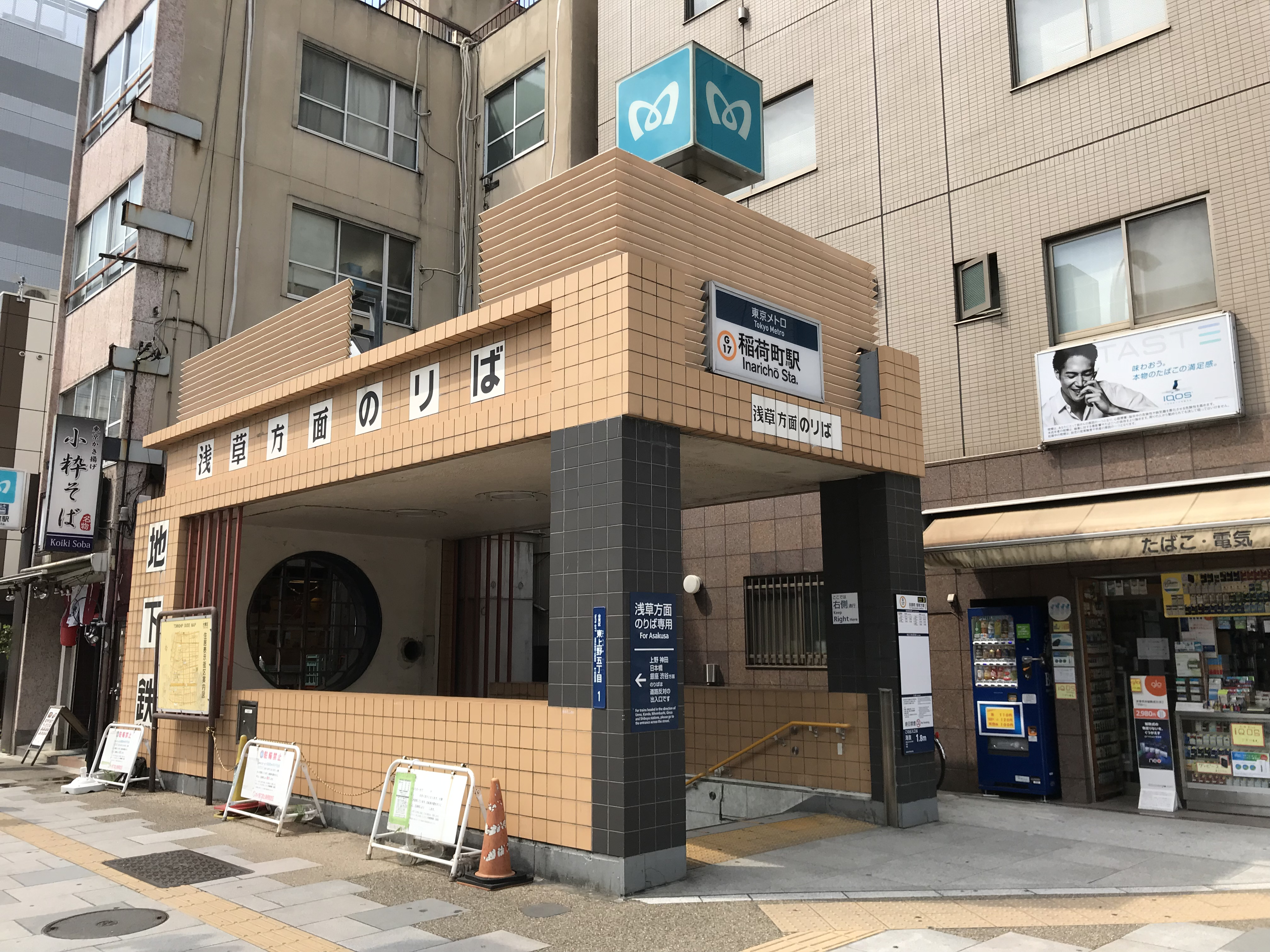 東京メトロ銀座線稲荷町駅3番出入口